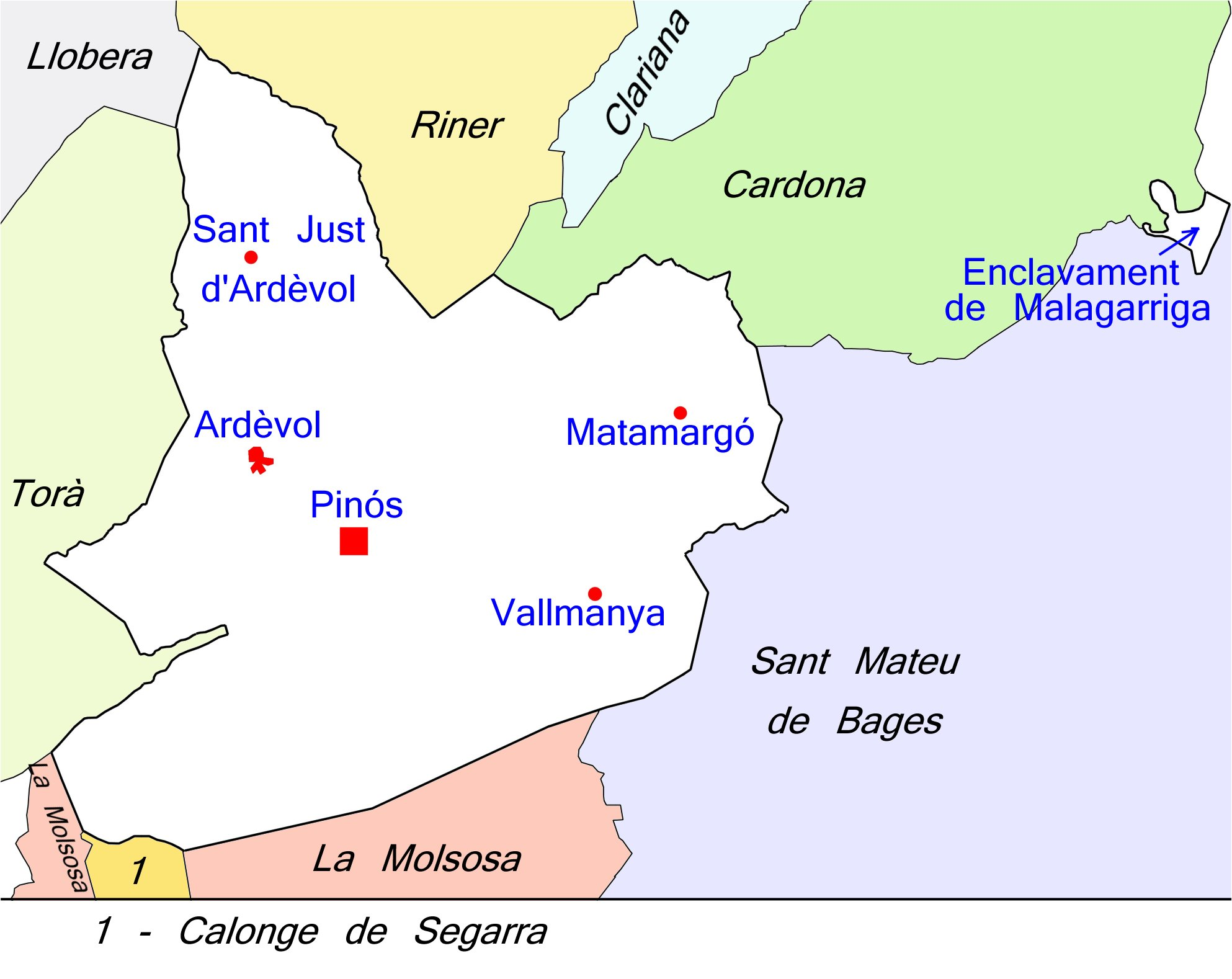 Mapa del municipi de Pinós (Solsonès) amb les seves entitats de població i els municipis limítrofes.